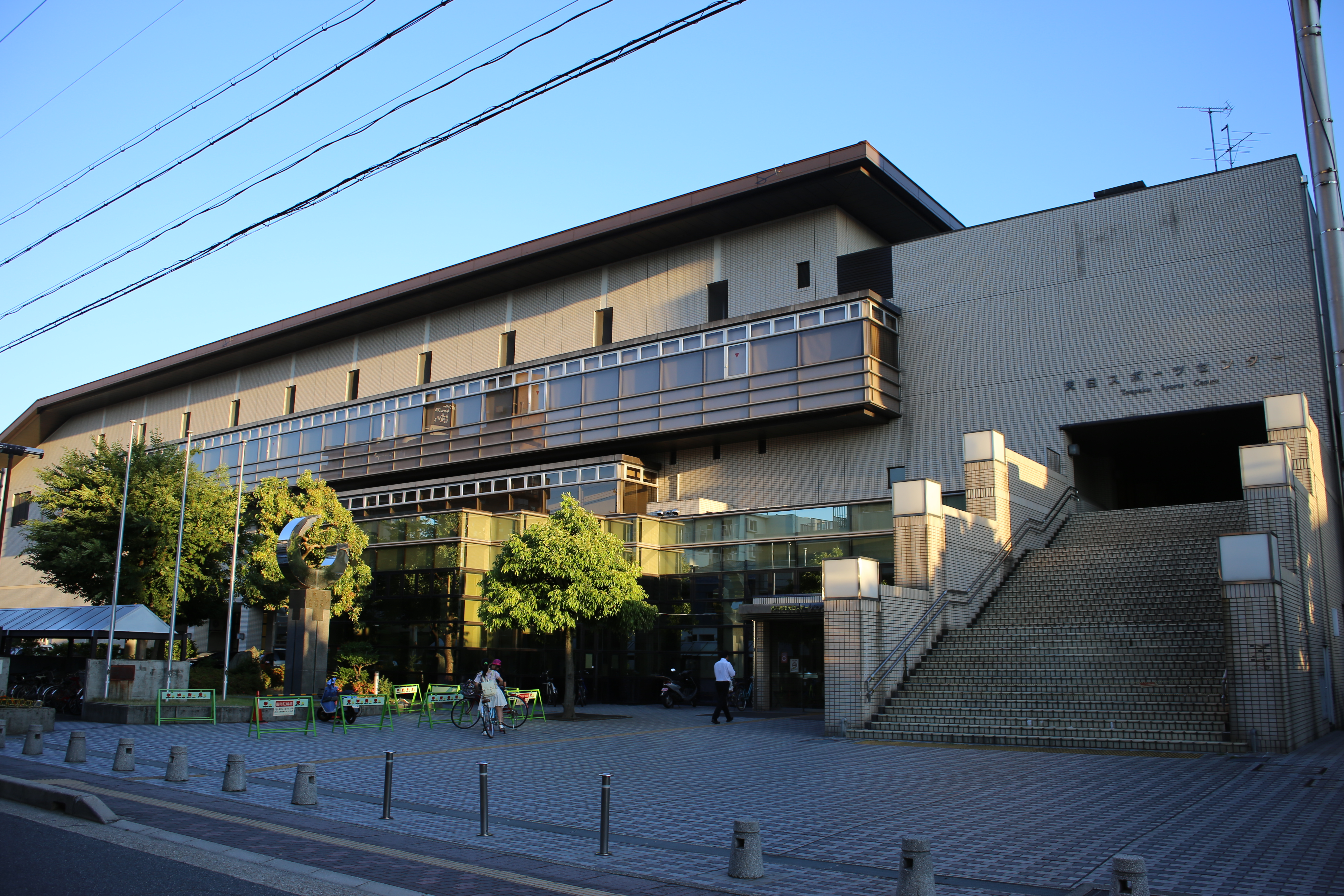 名古屋市天白区の名古屋市天白スポーツセンターを北側公道西側より撮影